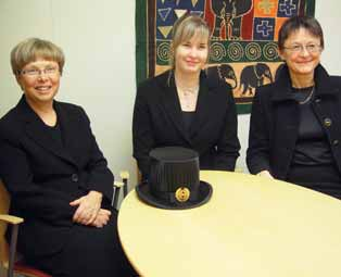 DI Anu Jääskeläisen (kesk,) vastaväittäjä professori Isabelle Magnin (oik.) sekä kustos, professori Ulla Ruotsalainen (vas.) väitöstilaisuuden jälkeen. Päydällä Ruotsalaisen tohtorinhattu. Tilaisuus oli poikkeuksellinen, sillä vastaväittäjä, väittelijä ja kustos olivat kaikki naisia.